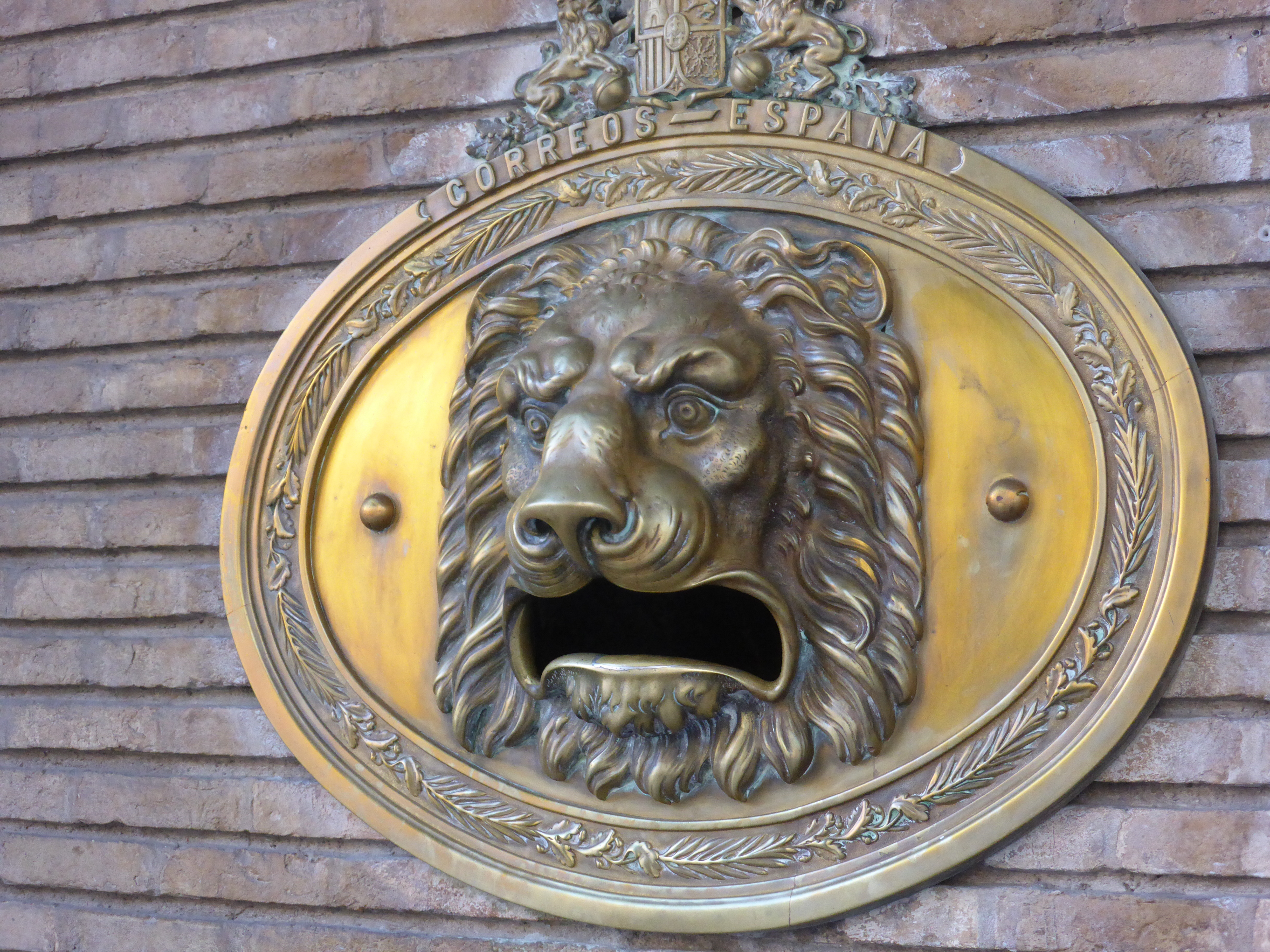 Buzón exterior en la sede de Correos del Paseo de la Independencia, en Zaragoza.